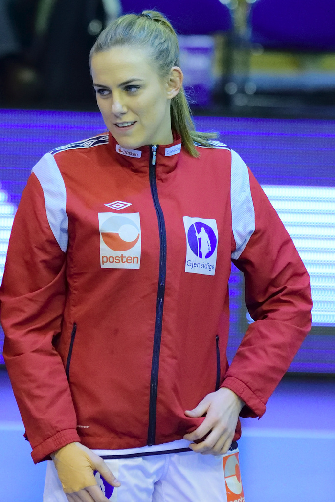 Emilie Hegh Arntzen, arrière gauche de l'équipe de Norvège de handball féminin. Le 19 mars 2015 lors du match de Golden League, Norvège / Pologne.